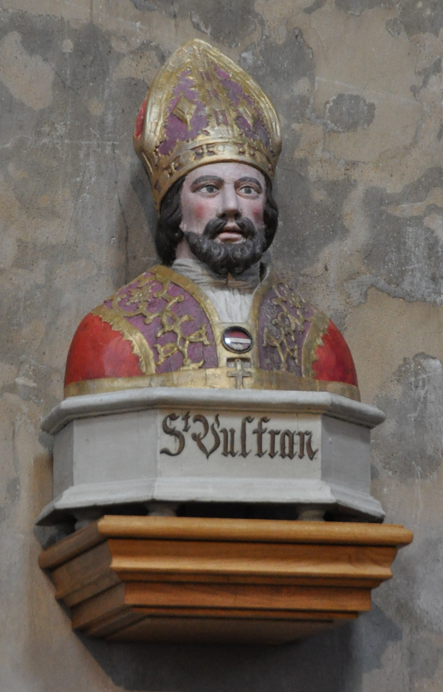 Saint-Vulfran, dans la collégiale d'Abbeville